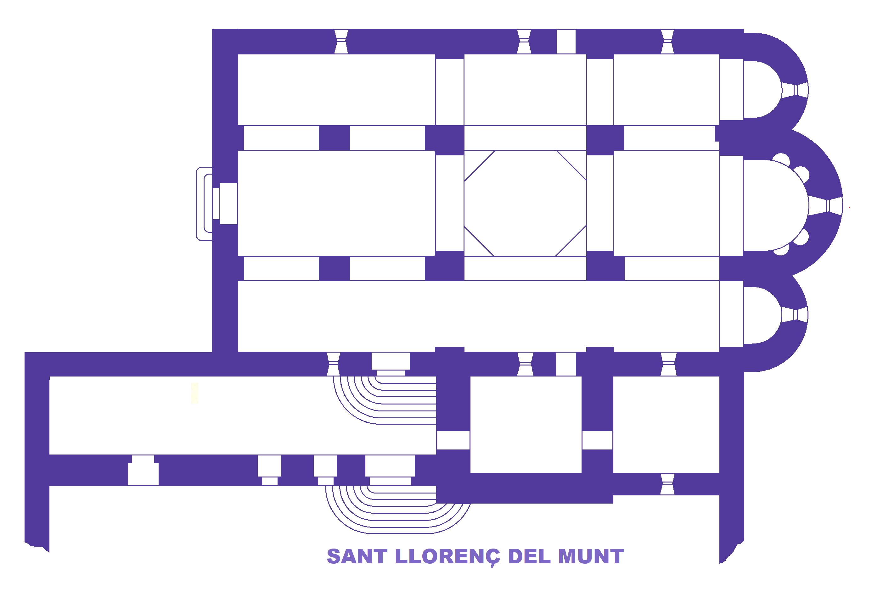 Sant Lorenç del Munt, Plan